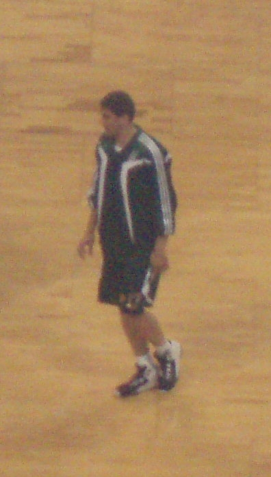 Prkacin Nikola35.JPG. PAO-EFES